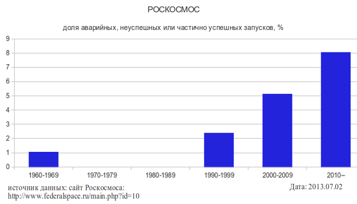 Роскосмос. Доля аварийных, неуспешных или частично успешных запусков. Примечание: общеее количество запусков, осуществленных Россией, может отличаться от количества запусков, осуществленных Роскосмосом